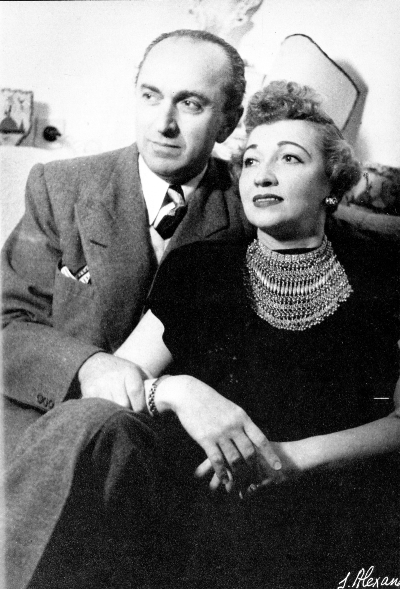 צילום מיום חתונתם של אדיס דה-פיליפ ושמחה אבן-זהר